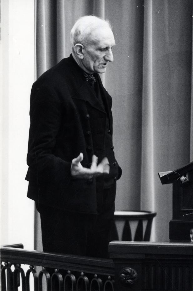 Het Zeeuwse kamerlid Kodde in klederdracht aan het woord in de Tweede Kamer over mislukking oesterteelt. Nederland, Den Haag, 27 maart 1963.